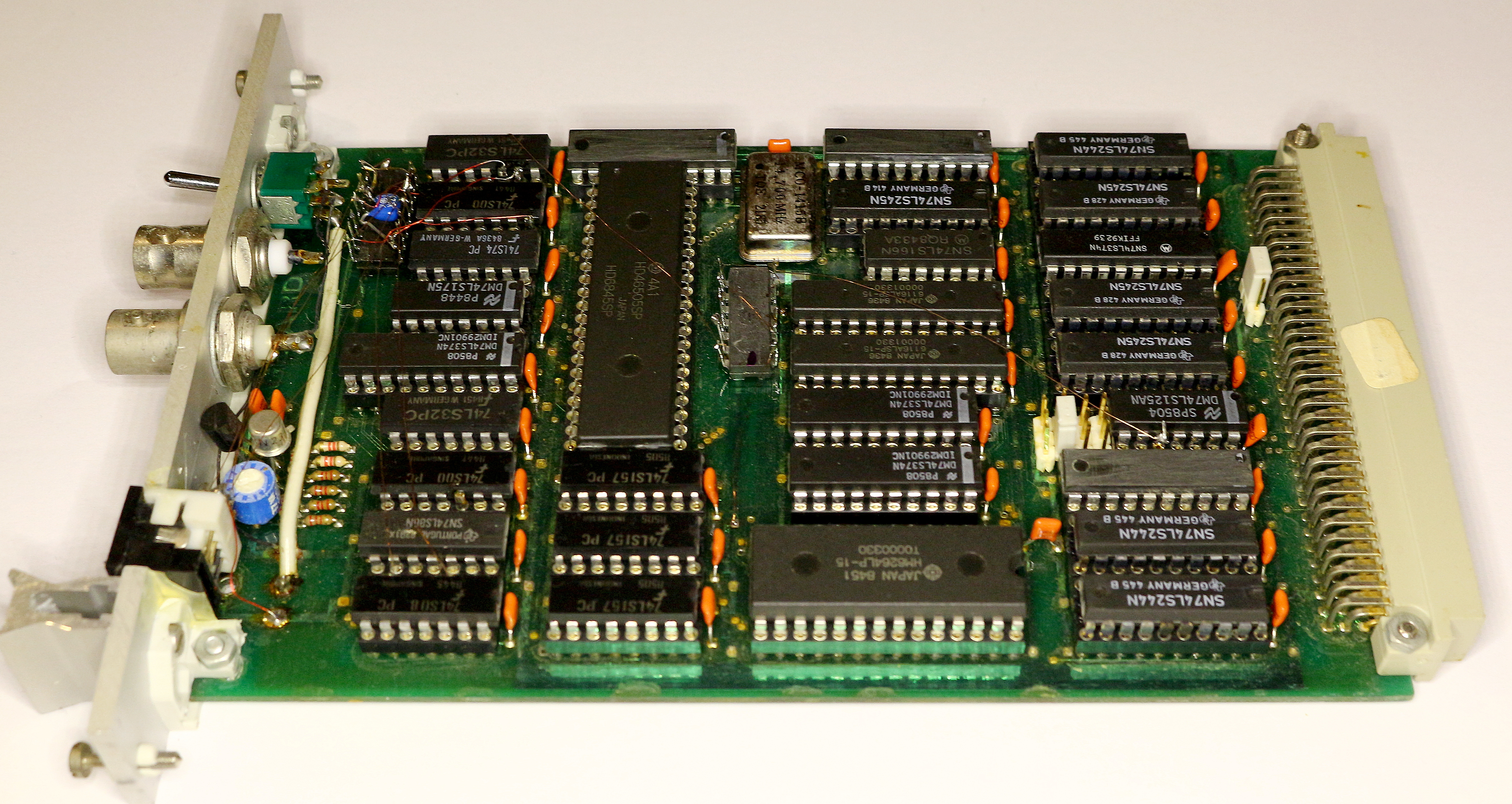 Beschreibung folgt